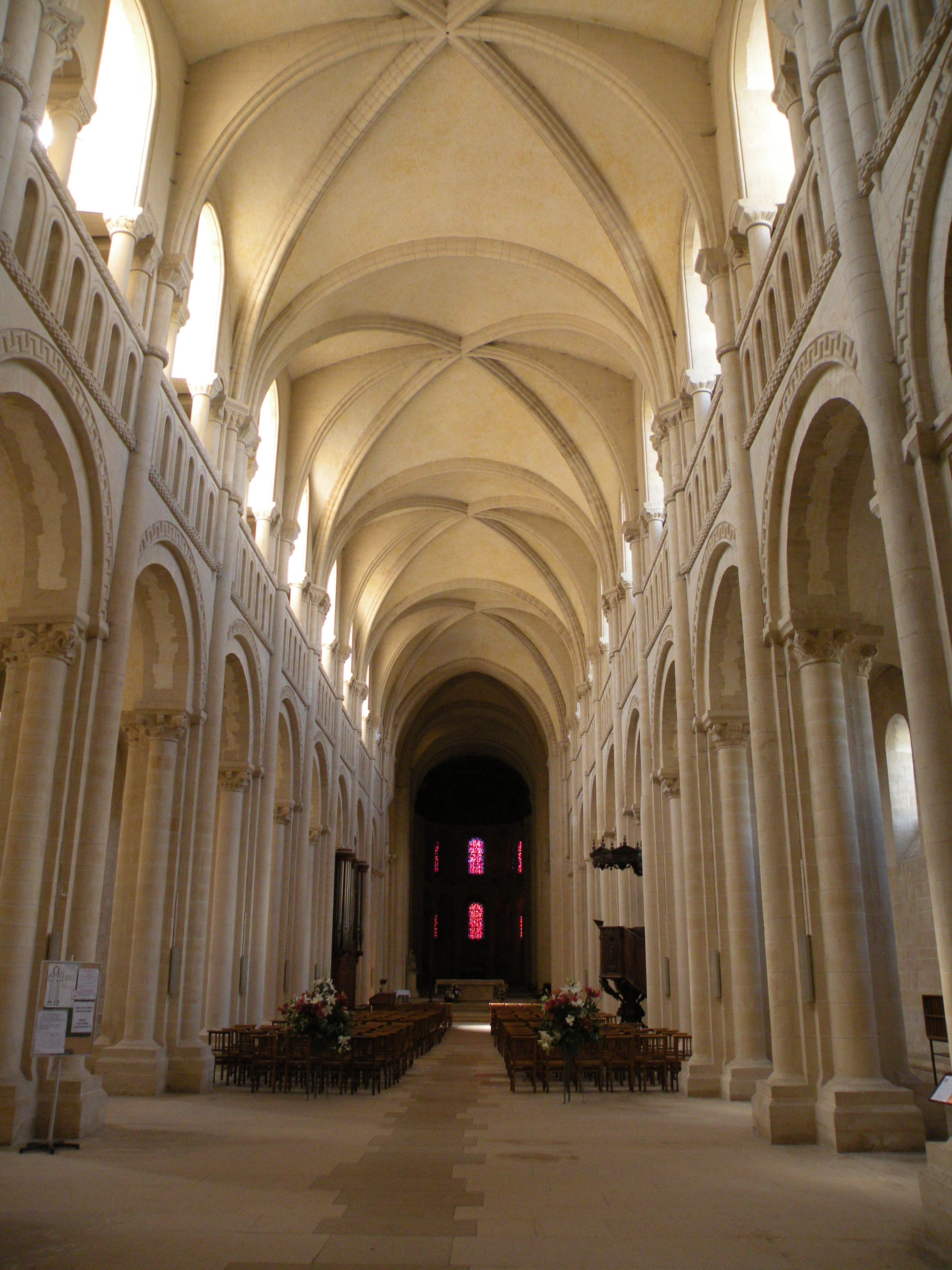 Église de la Trinité de Caen